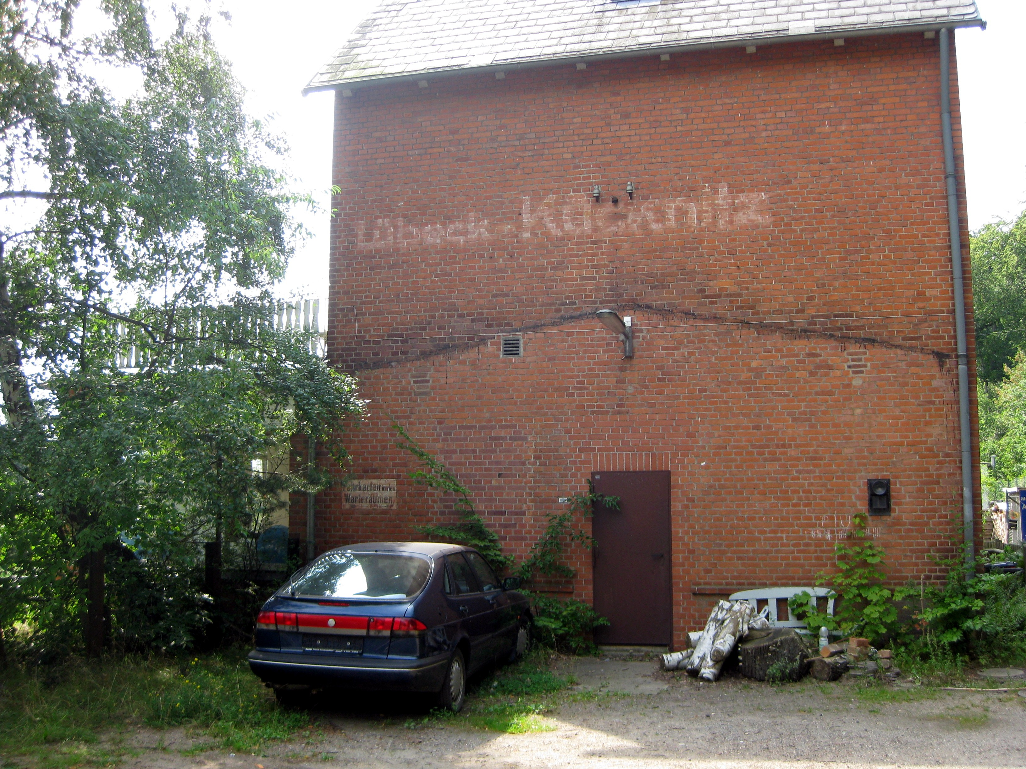 Ehemaliges Bahnhofsgebäude des Bahnhofs Lübeck-Kücknitz am Waldhusener Weg, also eher in Lübeck-Siems. Die verblichene Beschriftung an der Hauswand unten links weist noch auf in den Warteräumen erhältliche Fahrkarten hin.